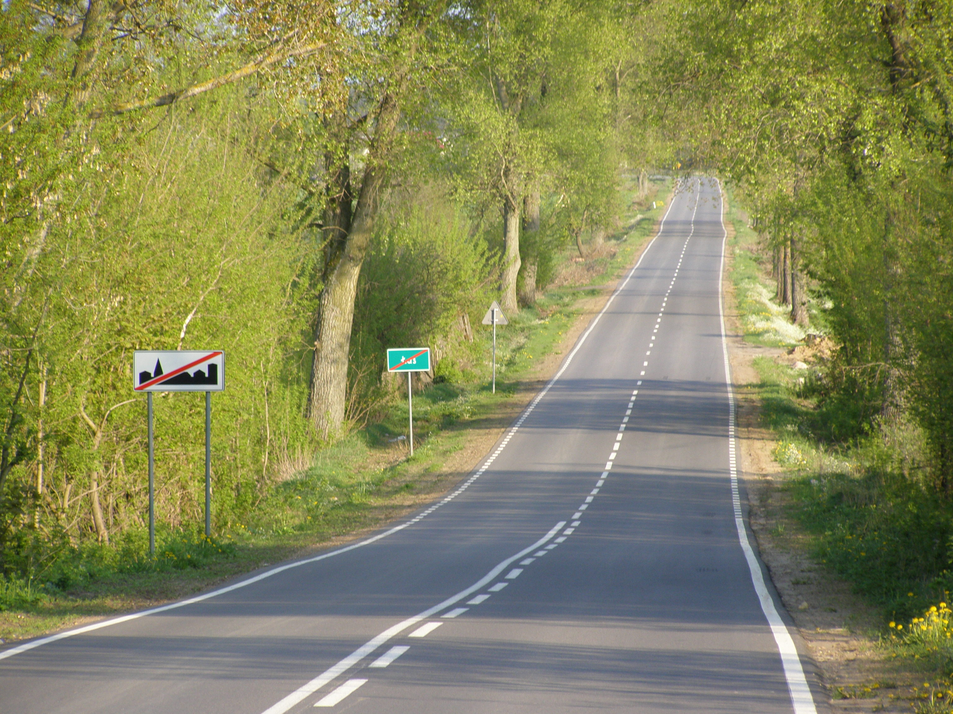 Łaś w kierunku Słojk